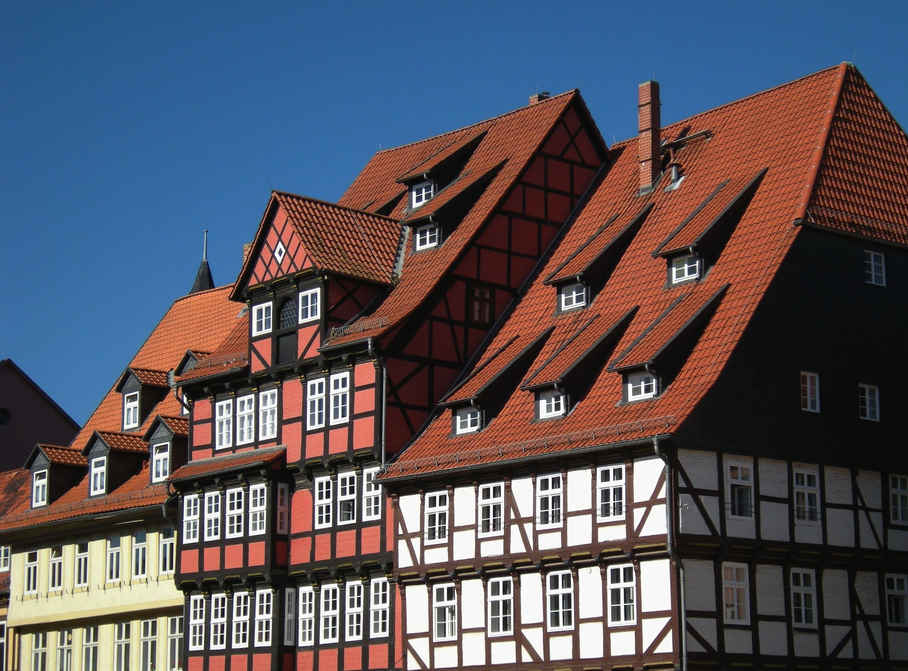 Quedlinburg - Fachwerkhäuser am Marktplatz.jpg